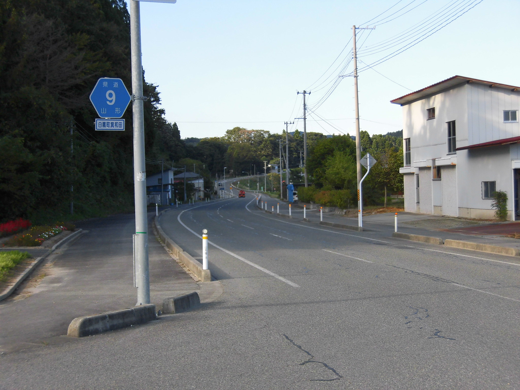 山形県道9号米沢高畠線。 撮影地は山形県西置賜郡白鷹町箕和田（みのわだ）付近。